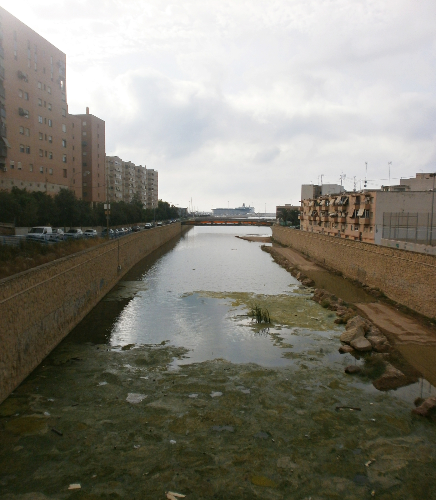 Vista de la desembocadura de la Rambla de las Ovejas (Barranco de las ovejas) en la ciudad de Alicante, España.